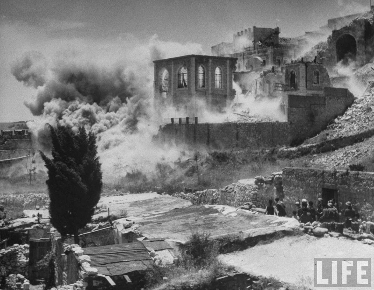 ישיבת פורת יוסף תחת אש במלחמת העצמאות